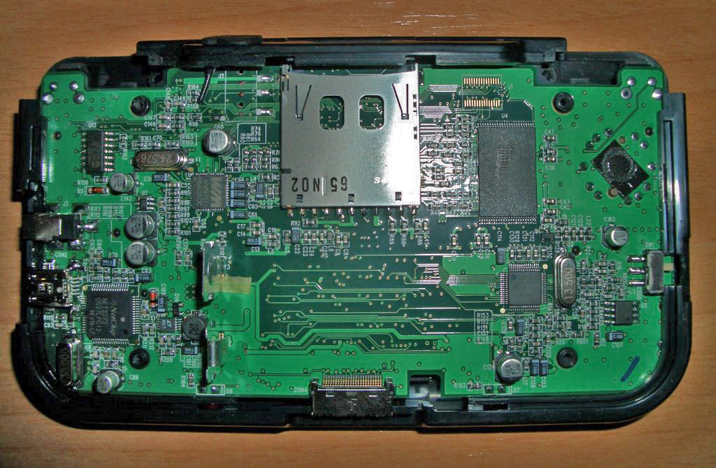 GP2X FX-100 Consola oberta, part posterior, on podem observar el slot per SD's...